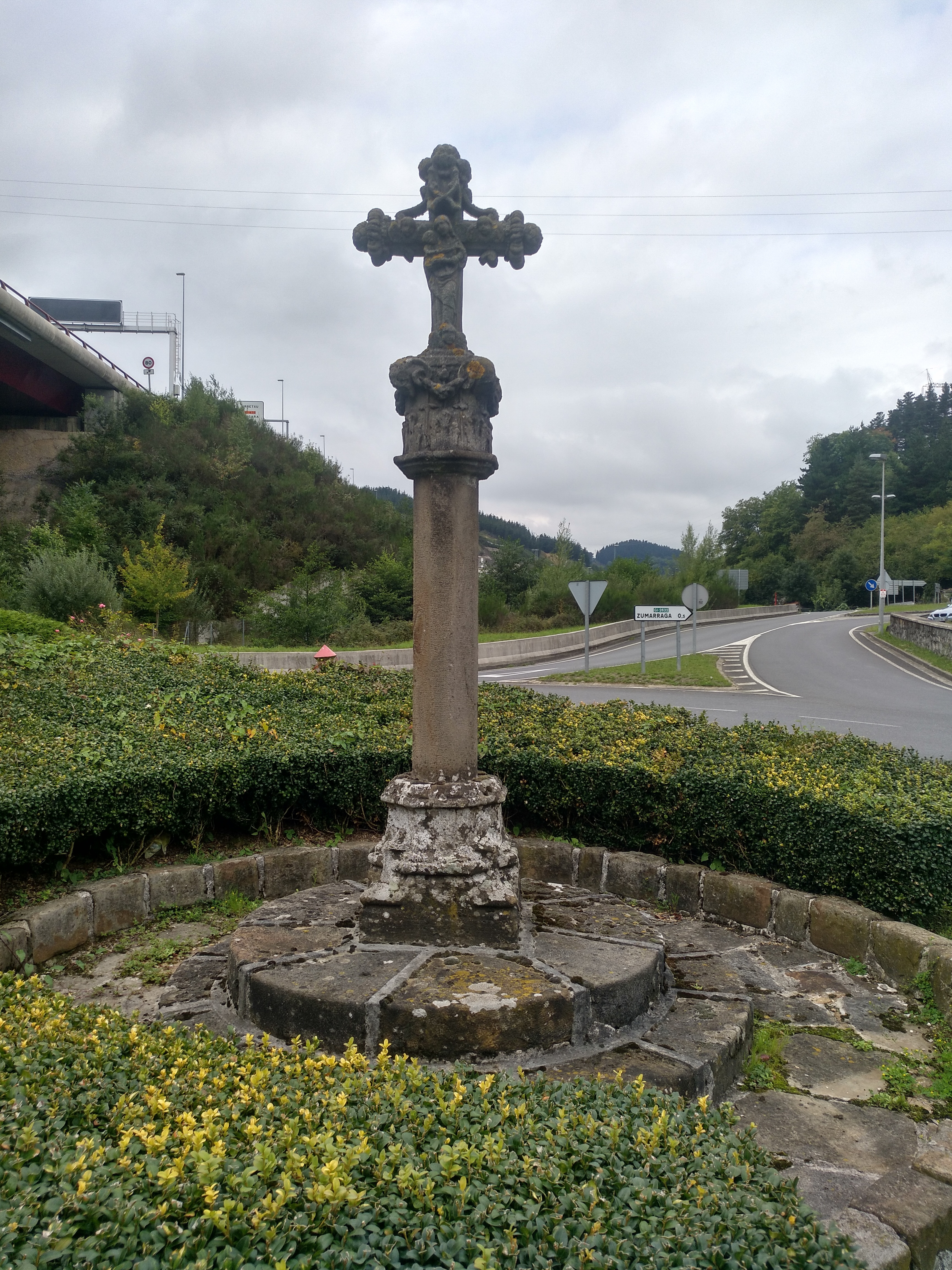 Mendiarazko gurutzea